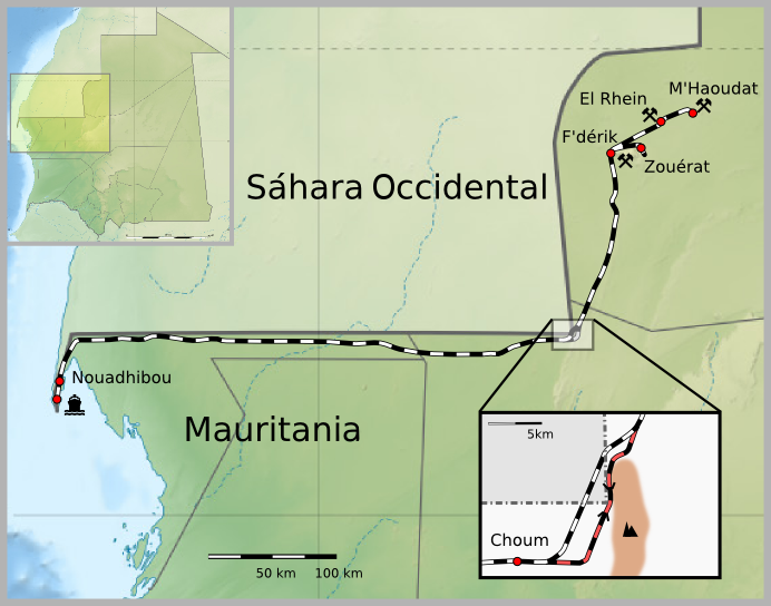 Ferrocarril Zouérat-Nouadhibou